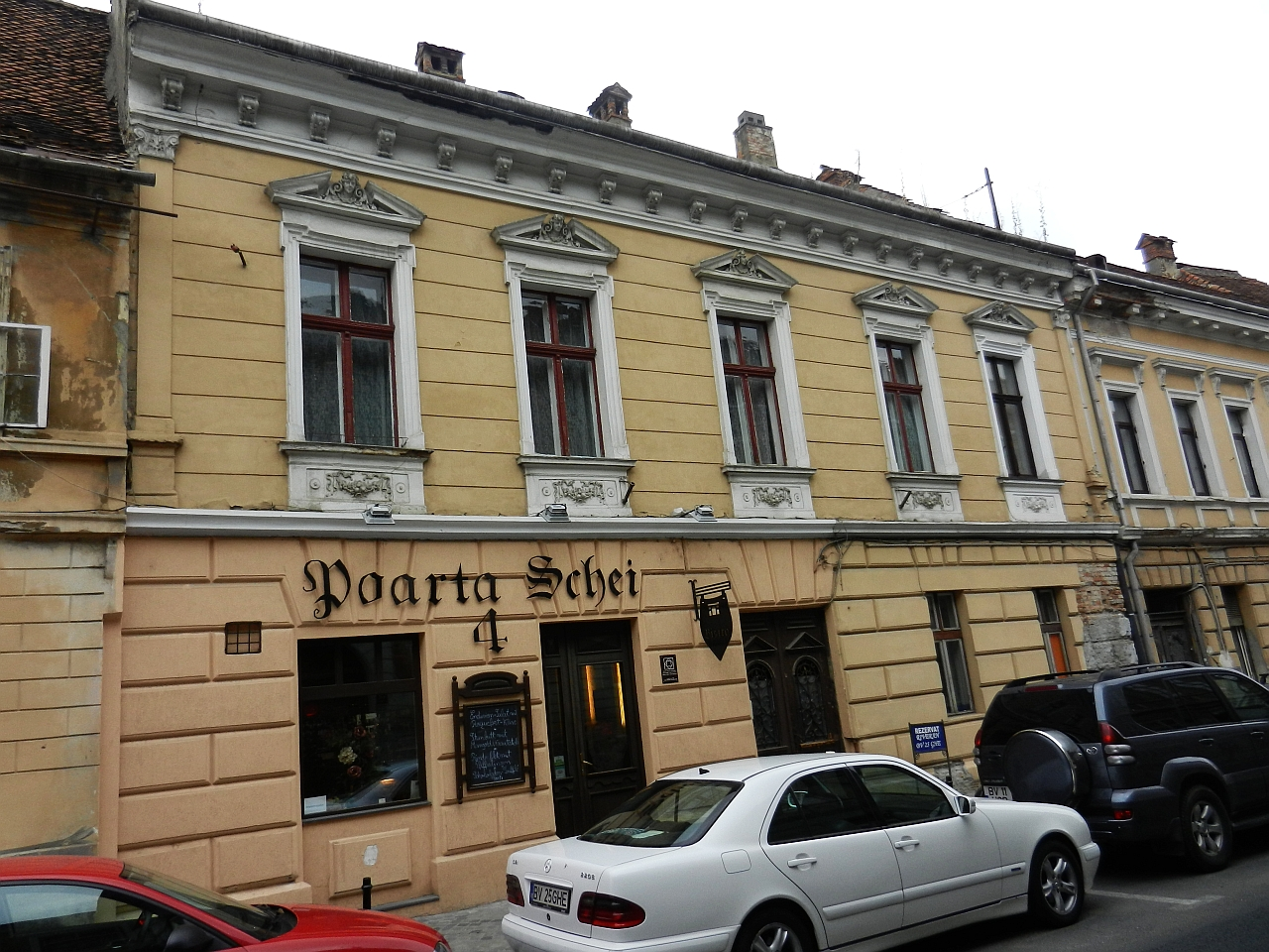 Casă monument istoric